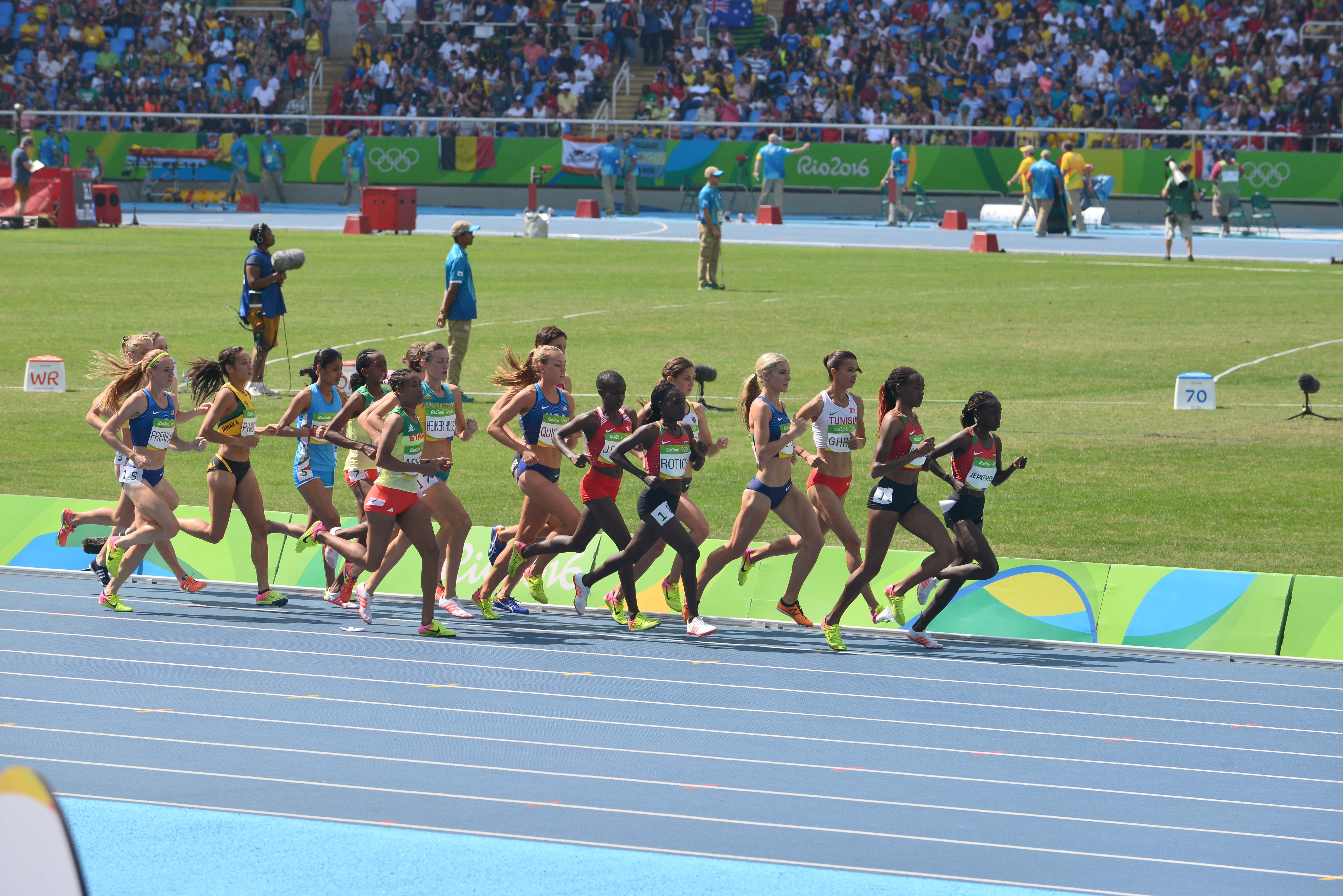 Finale du 3000m steeple des jo de Rio 2016